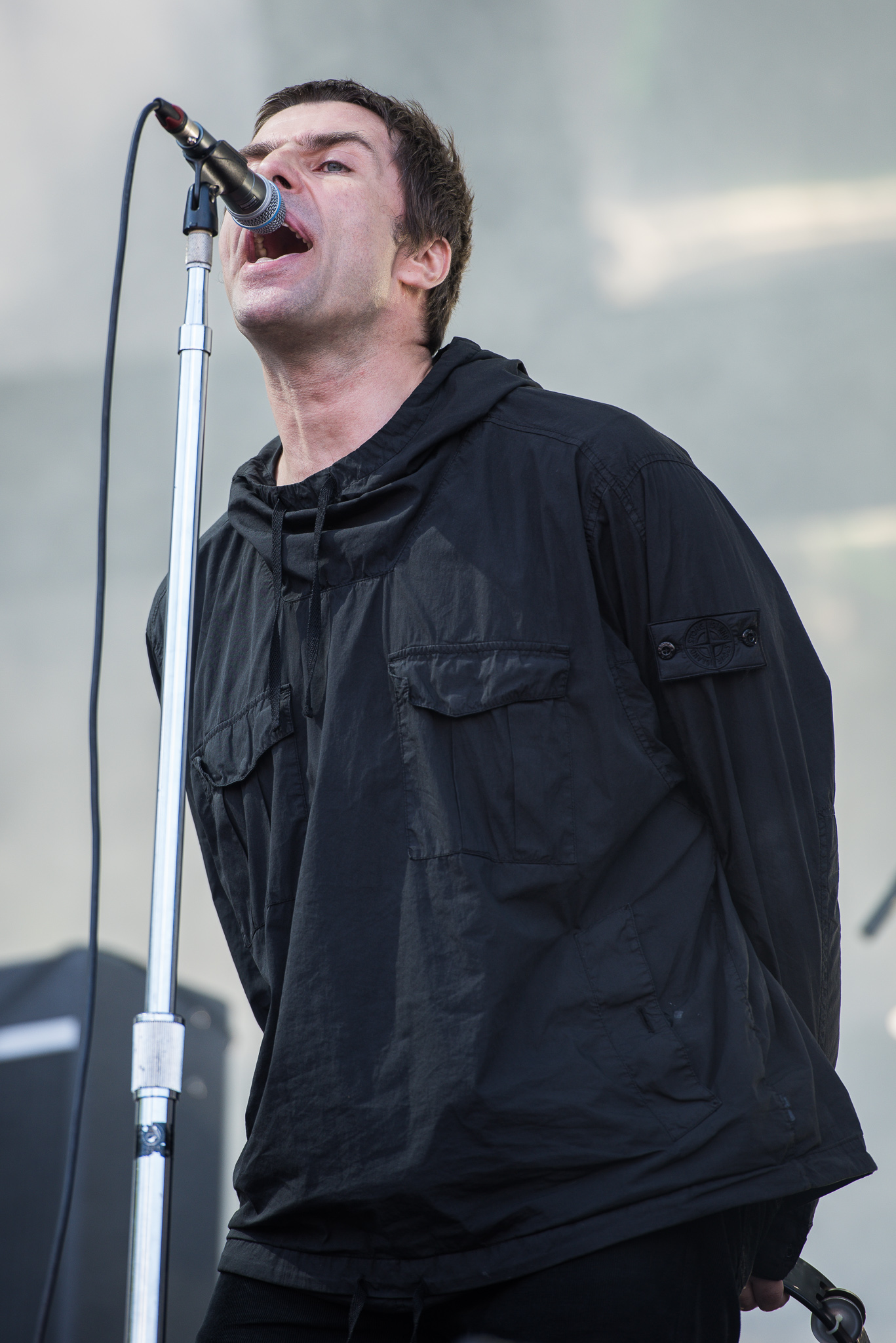 ARGO-Konzerte,Beck's Park Stage,Konzert,Liam Gallagher,Livekonzert,Livemusik,Musik,RiP,Rock im Park 2017